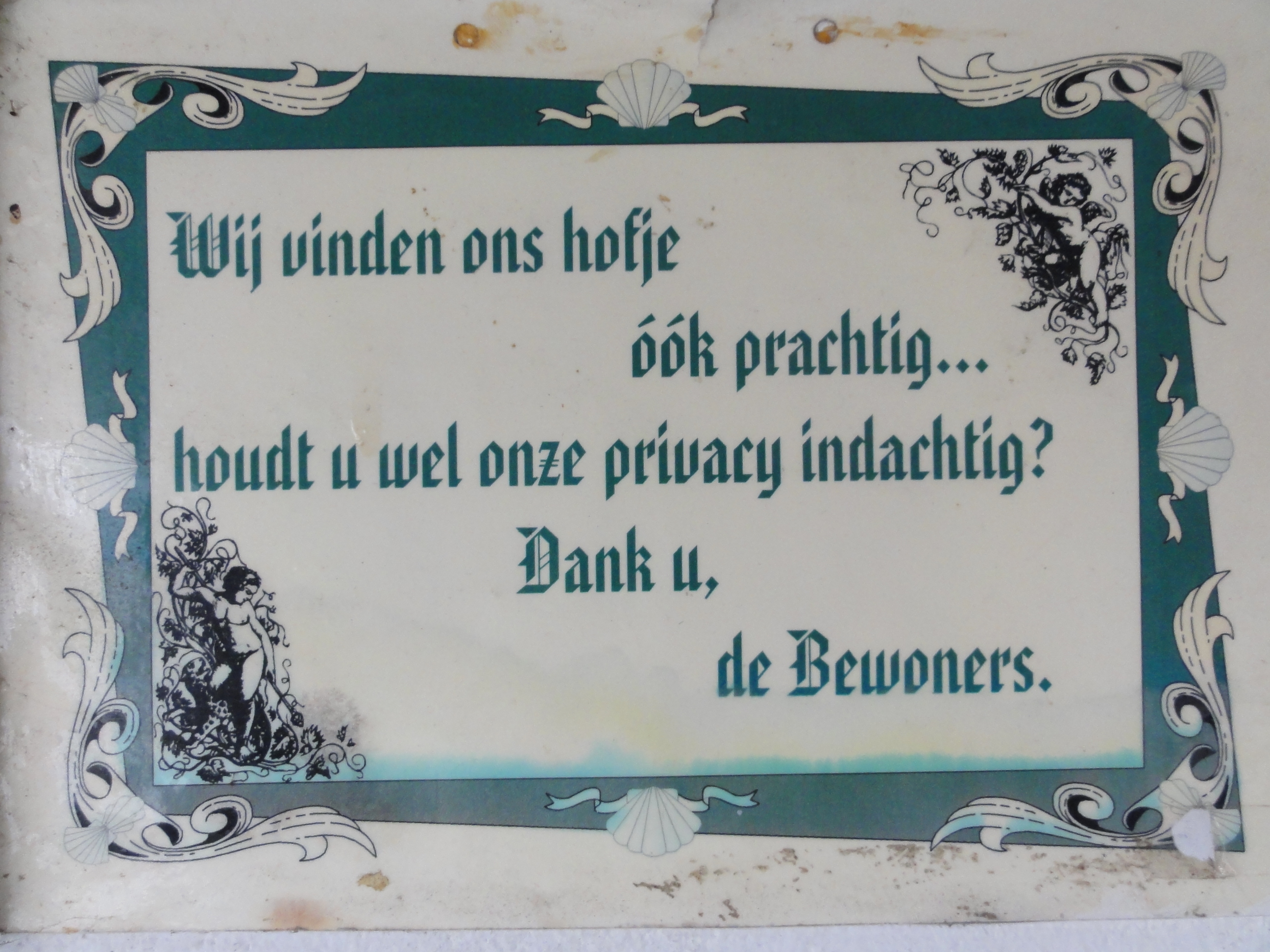 Privacyverzoek in het Brouchovenhofje aan de Papengracht 16 te Leiden